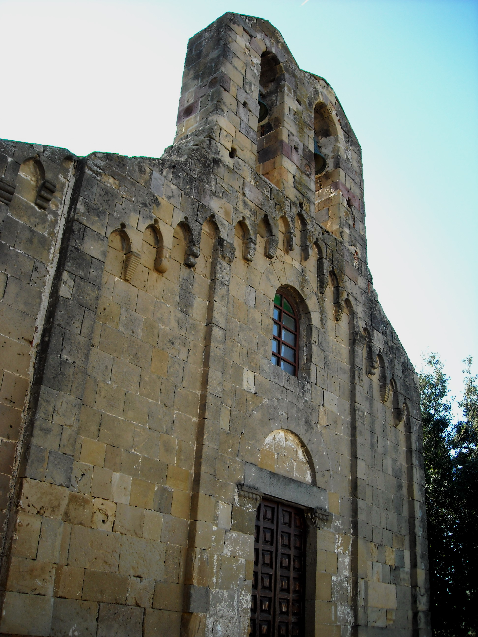 Chiesa di San Pietro, Villamar (VS)